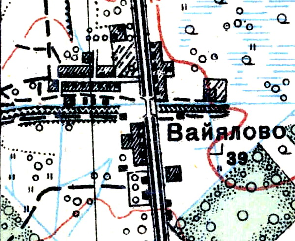 Топографическая карта Ленинградской области, квадрат О-36-13-А-б (Пос. Тайцы), деревня Вайялово